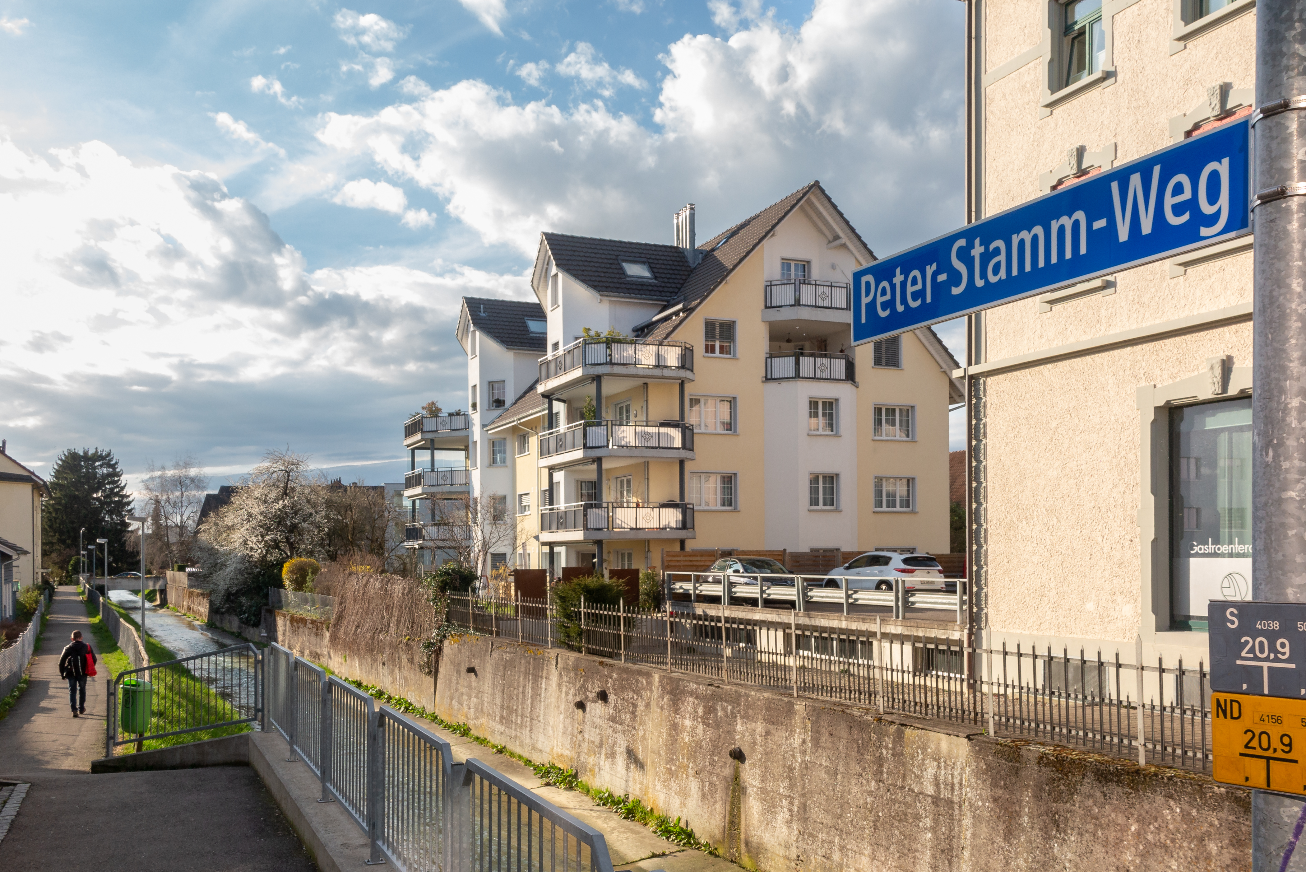 Kleine Ehrung: Peter-Stamm-Weg in Weinfelden.